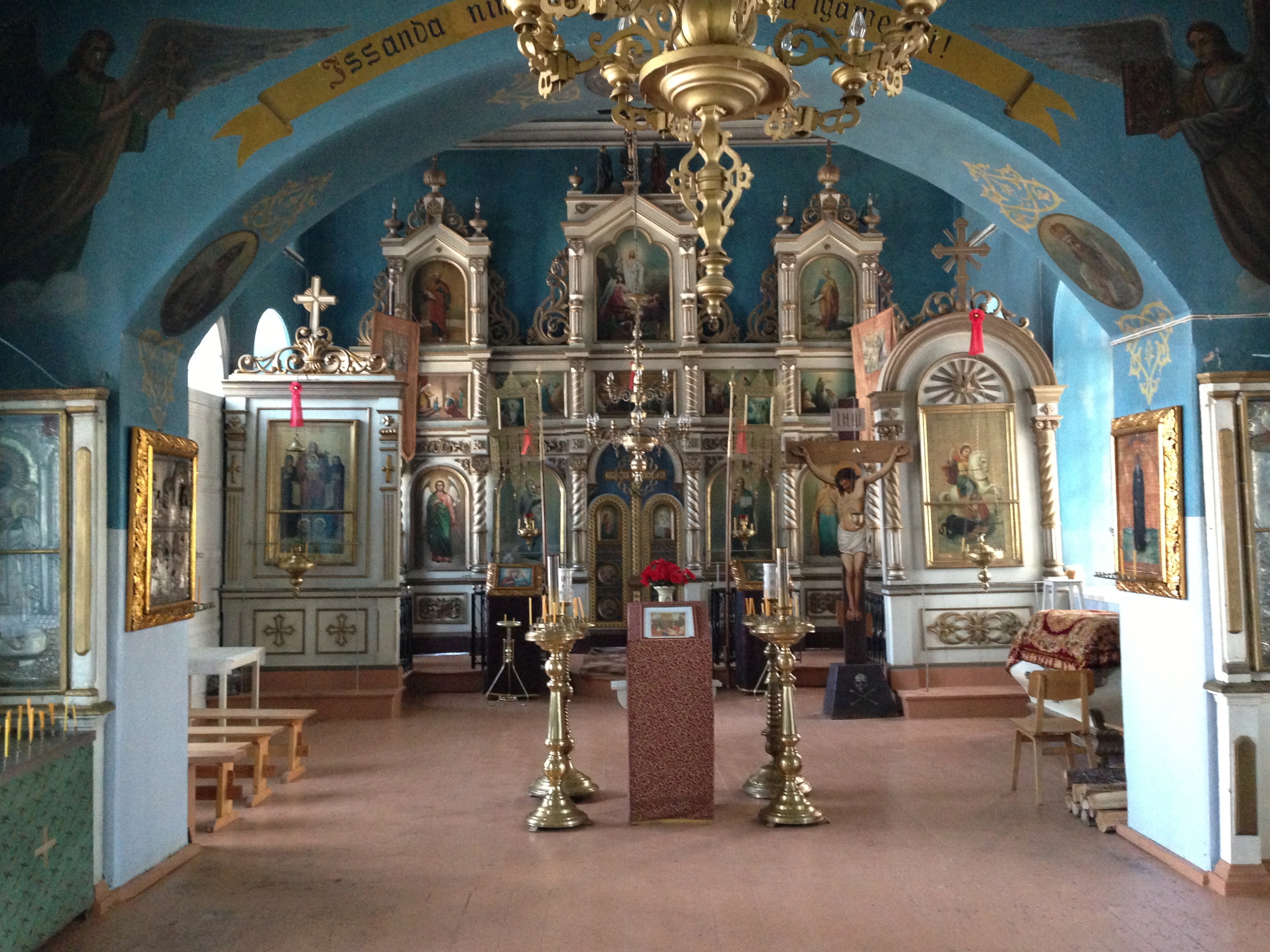 Värska Püha Georgiuse kiriku sisevaade